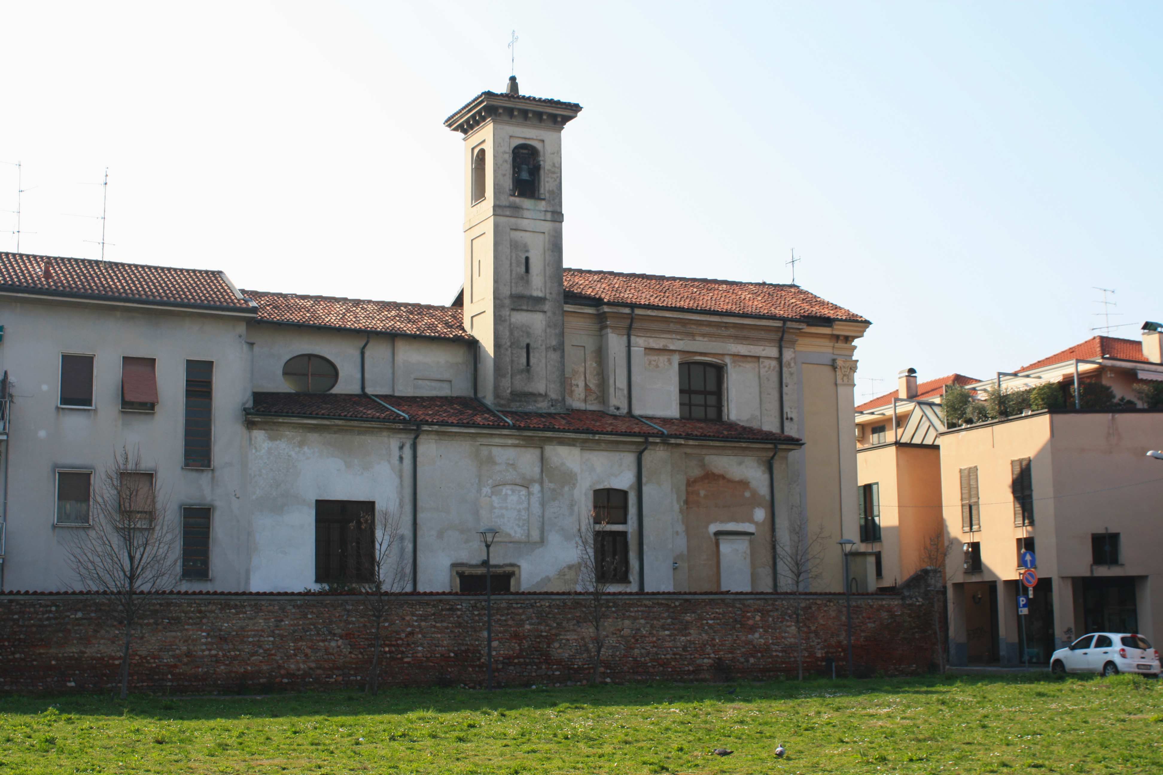 Lato est della chiesa di San Rocco a Busto Arsizio.